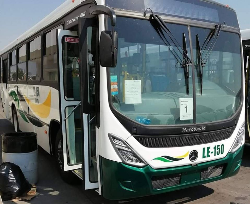 Unidad LE-150